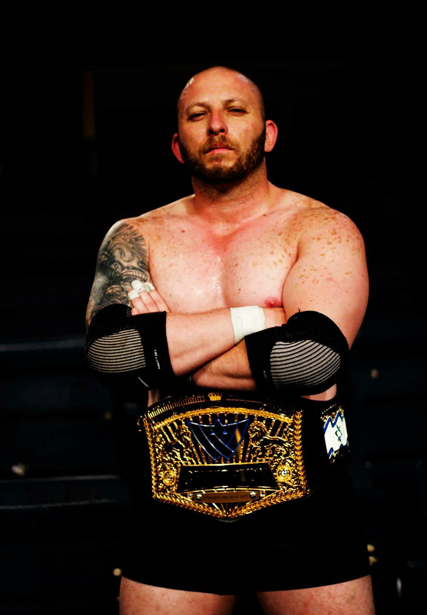 האלוף הראשון של ליגת ההיאבקות הישראלית - בן "האייסמן" רוזין - לאחר זכייתו בתואר במופע הראשון (צילום: אלון לוין)